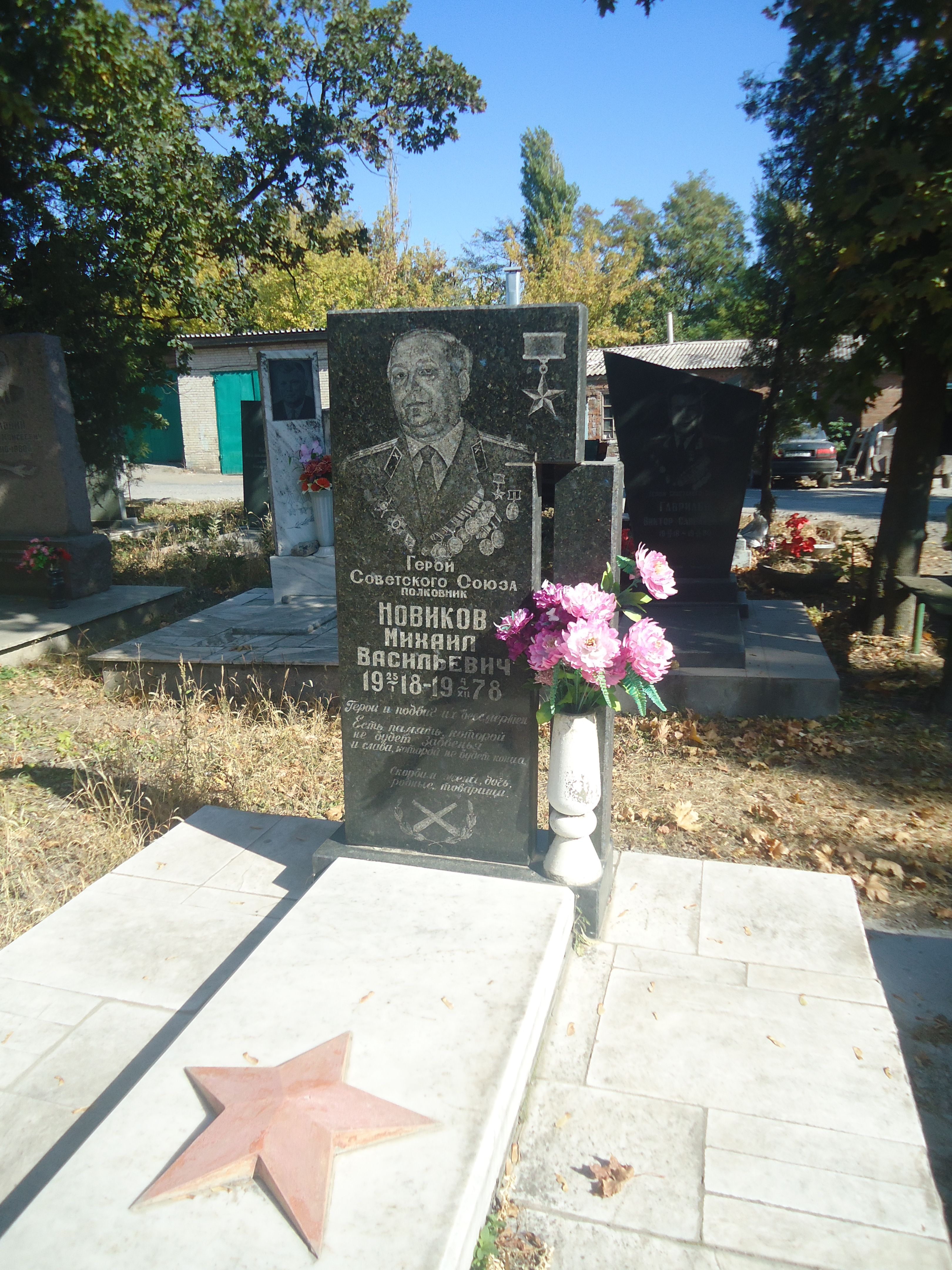 Надгробный памятник на могиле Героя Советского Союза Новикова Михаила Васильевича